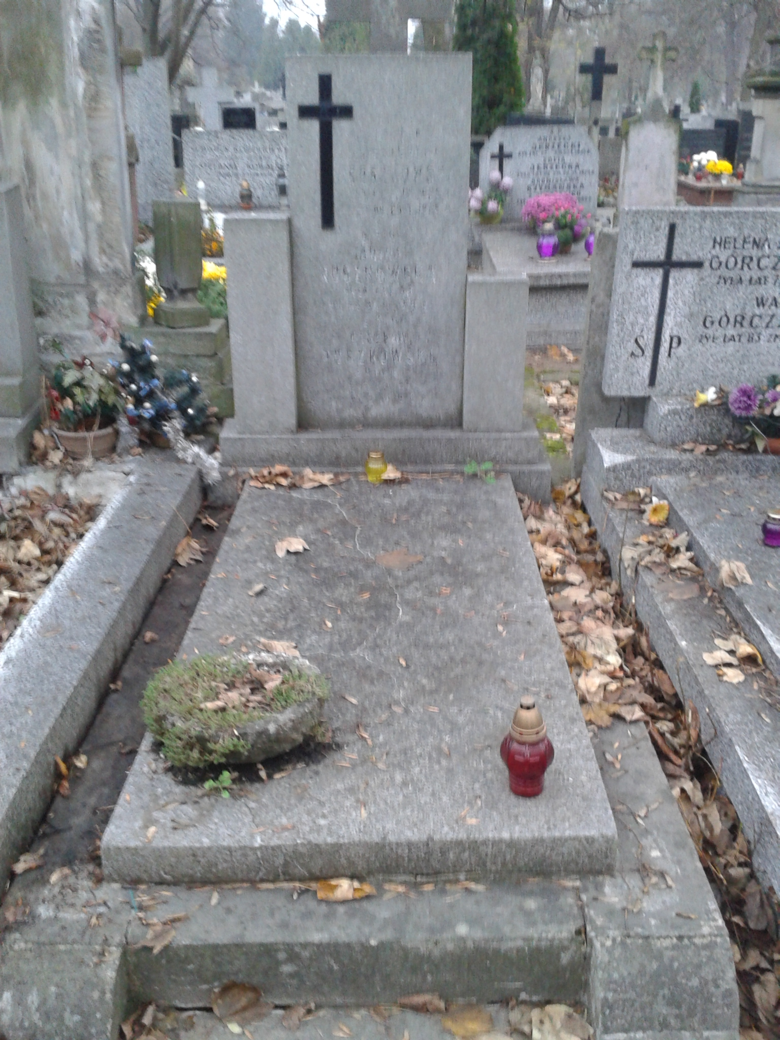 Grób aktora Czesława Roszkowskiego